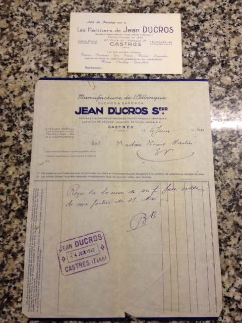 papier à entête datant de 1950